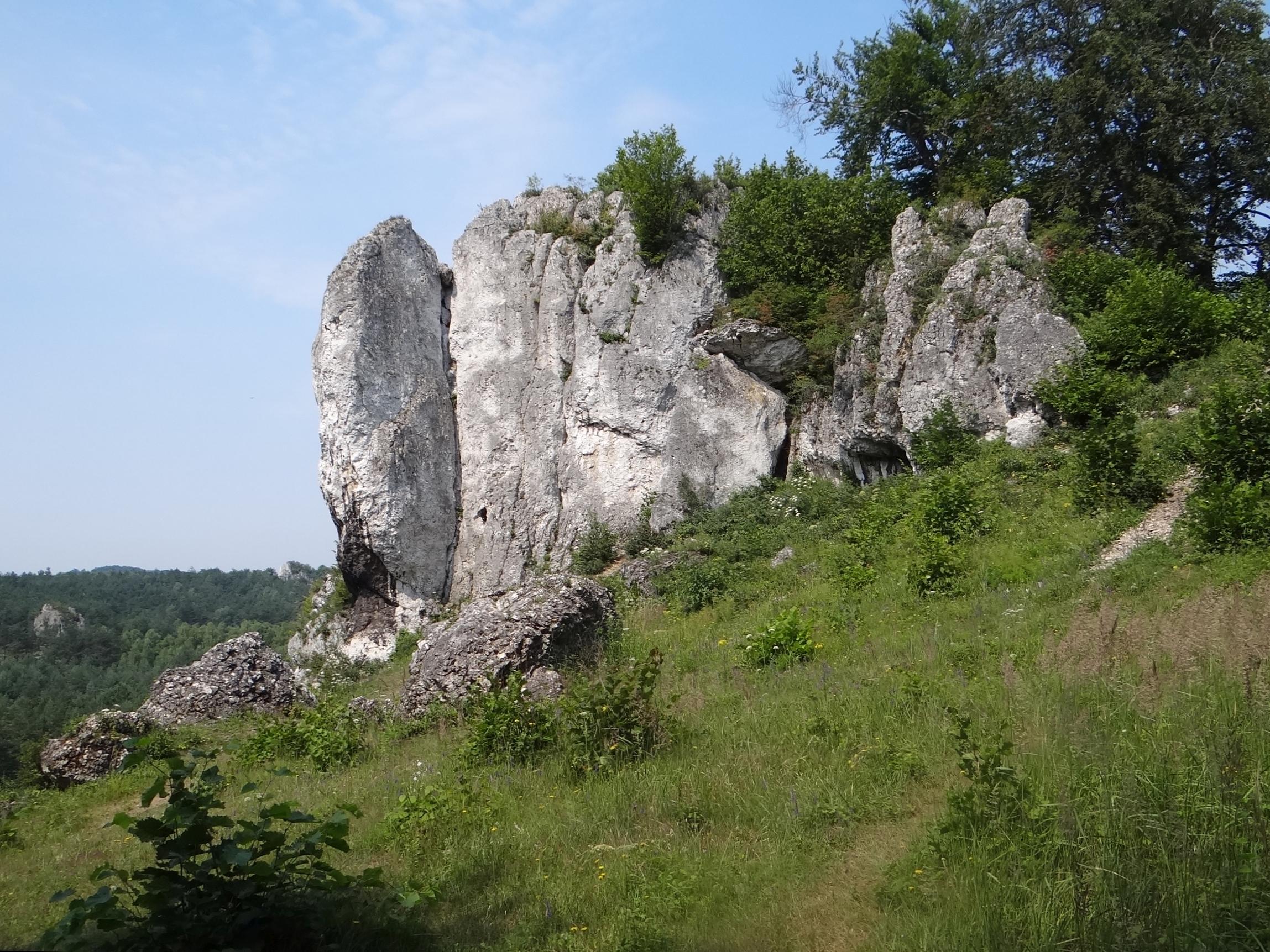 Krucze Skały na Górze Zborów w Podlesicach